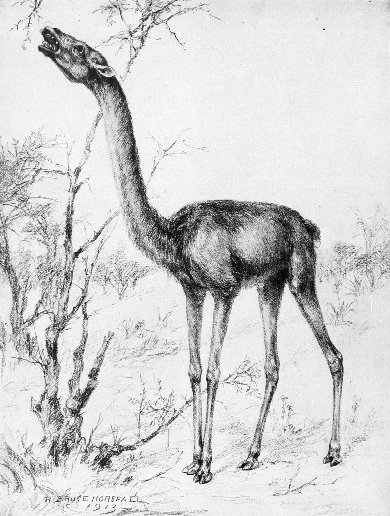 Procamelus (formerly Alticamelus) altus